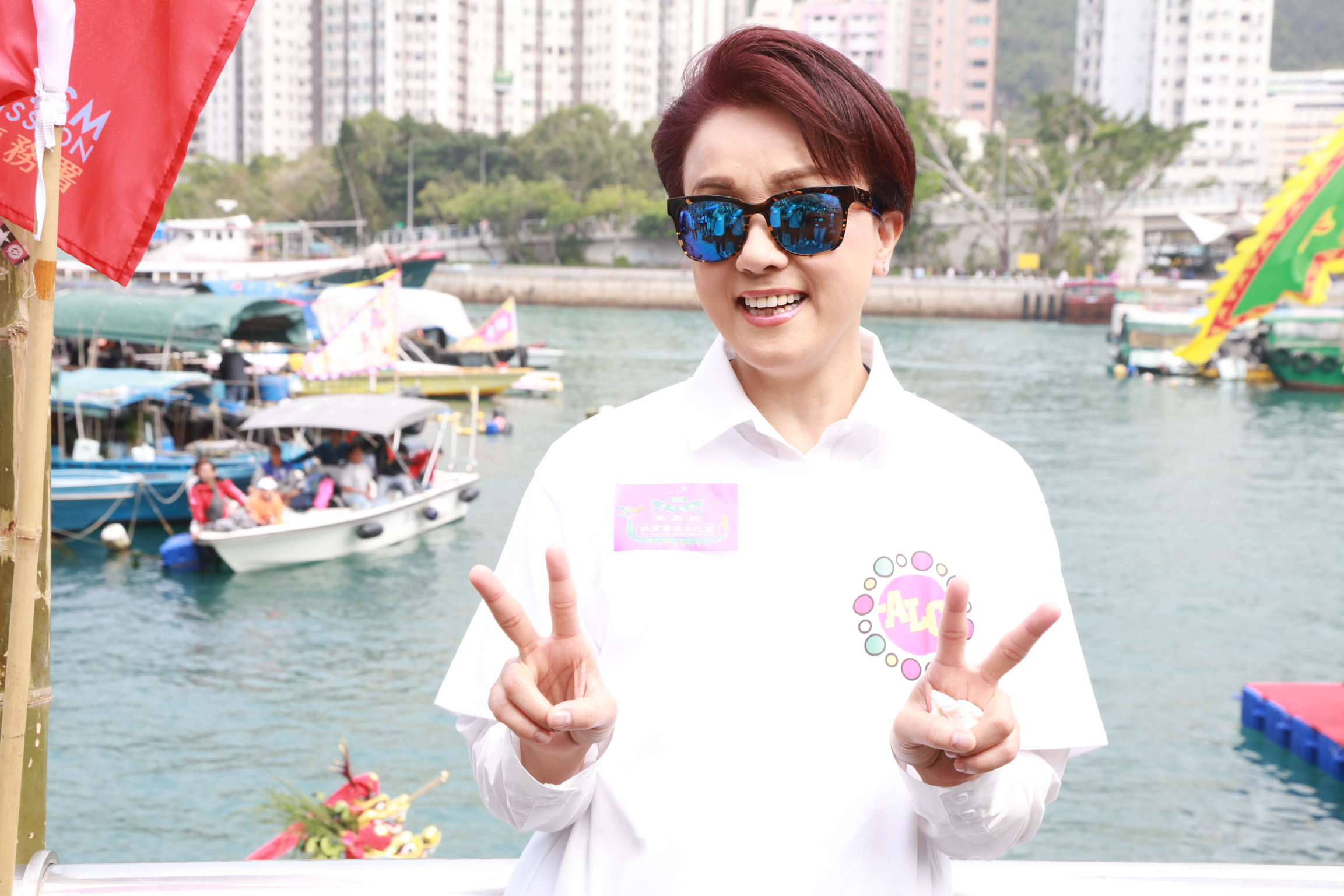 鴨脷洲傳統文化節 joycekoi 2019-03-17